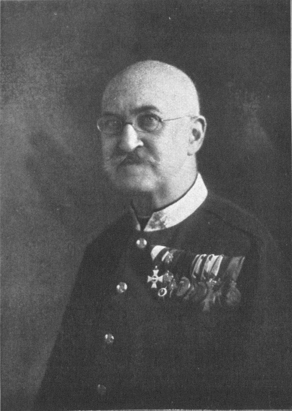 „Se. königl. Hoheit Herzog Ernst August von Cumberland“